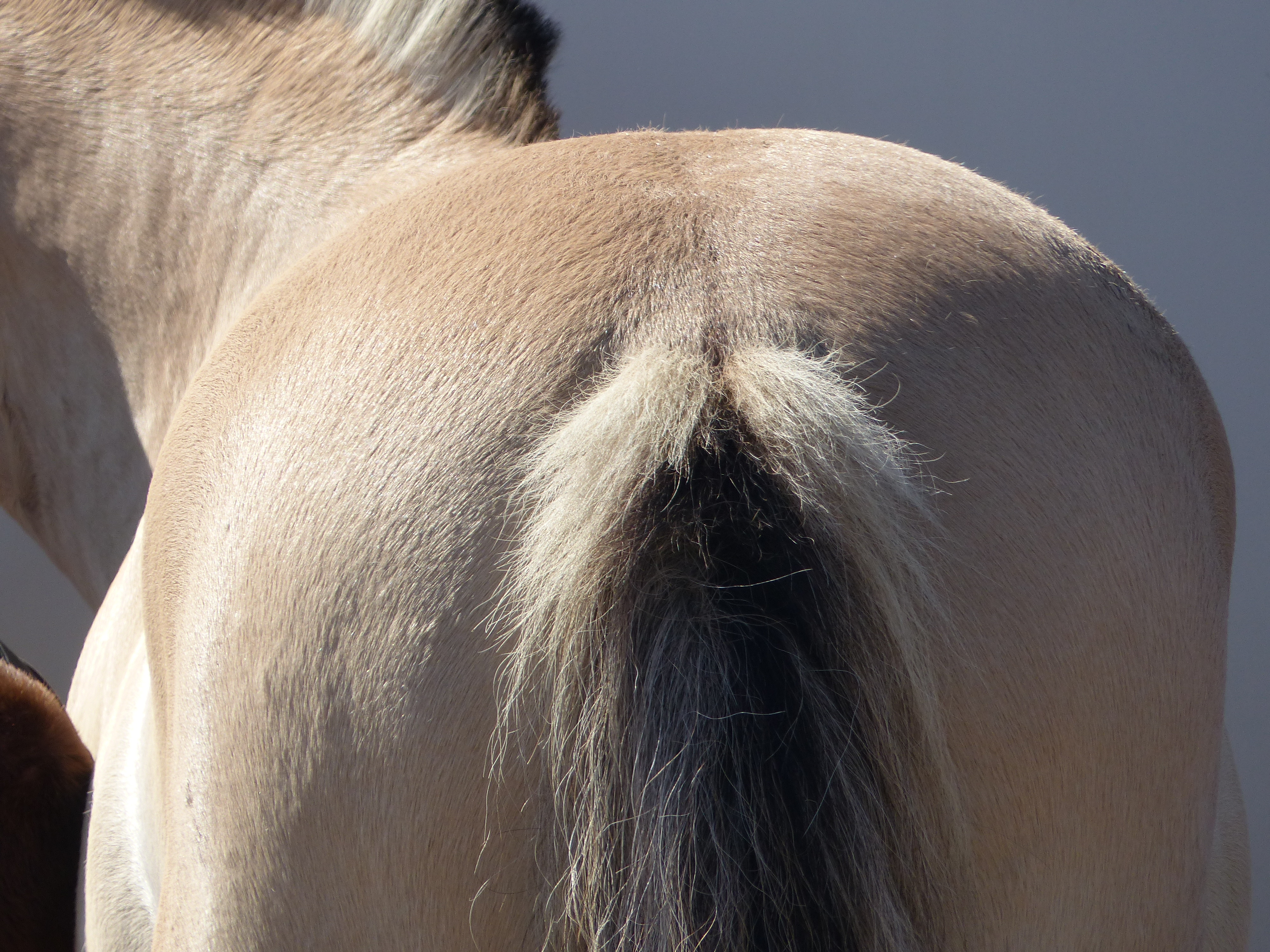 Croupe et queue d'un cheval de race Fjord, bai dun avec raie de mulet visible à la Fête du cheval de l'âne et du poney à Rennes, La Prevalaye, septembre 2019